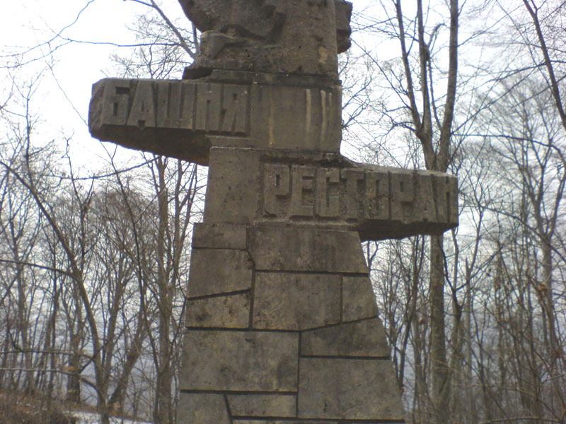 На горе Ахун, в районе Сочи